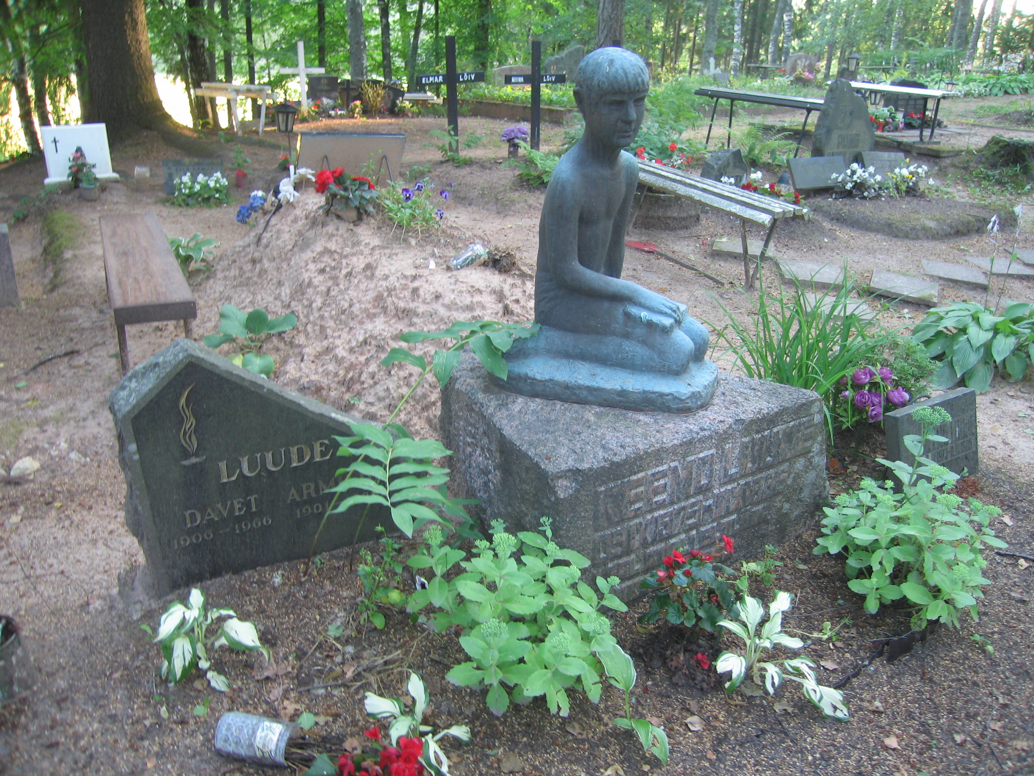 Hauad ja hauatähised kalmistul.Foto: Robert Treufeldt, 2. august 2014